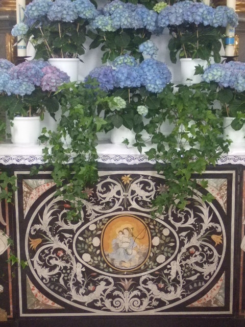 Pfarrkirche St. Martin, Hausen am Bussen, Alb-Donau-Kreis Scagliola-Arbeit am Seitenaltar (Stuckdekor mit Madonna und Kind)